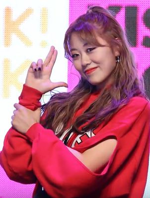 10월 11일 오후 서울 용산구 블루스퀘어에서 첫 번째 싱글 앨범 'KISS, KICKS' 발매 프레스 쇼케이스를 가졌다.